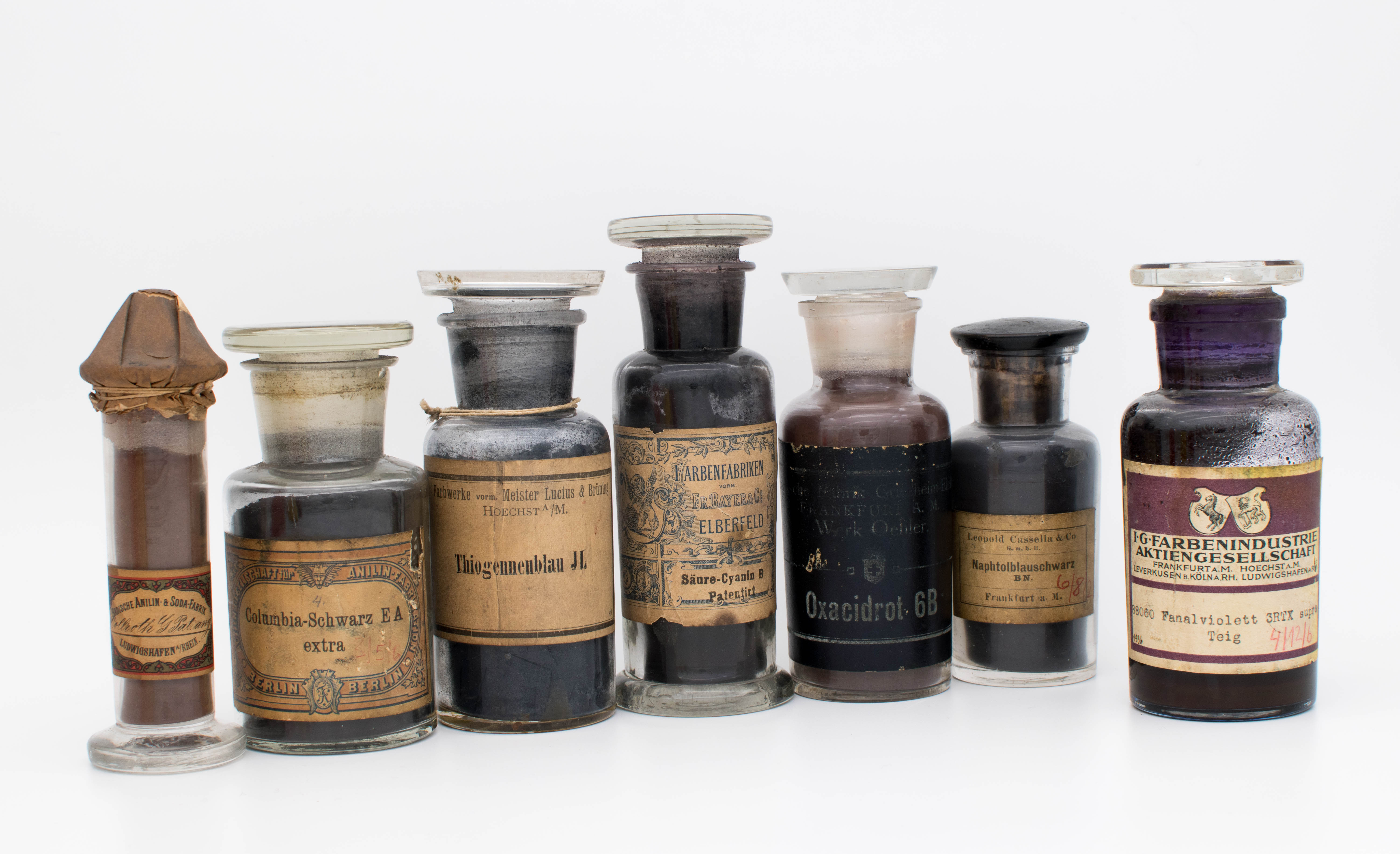 Ein Auswahl von Farbstoffen aus der Zeit vor und nach der Gründung der IG Farben. BASF, AGFA, Farbwerke Höchst, Bayer, Griesheim-Elektron Werk Oehler, Leopold Cassella. Bereitgestellt und Fotografiert von der Sammlung Rosak in Frankfurt.